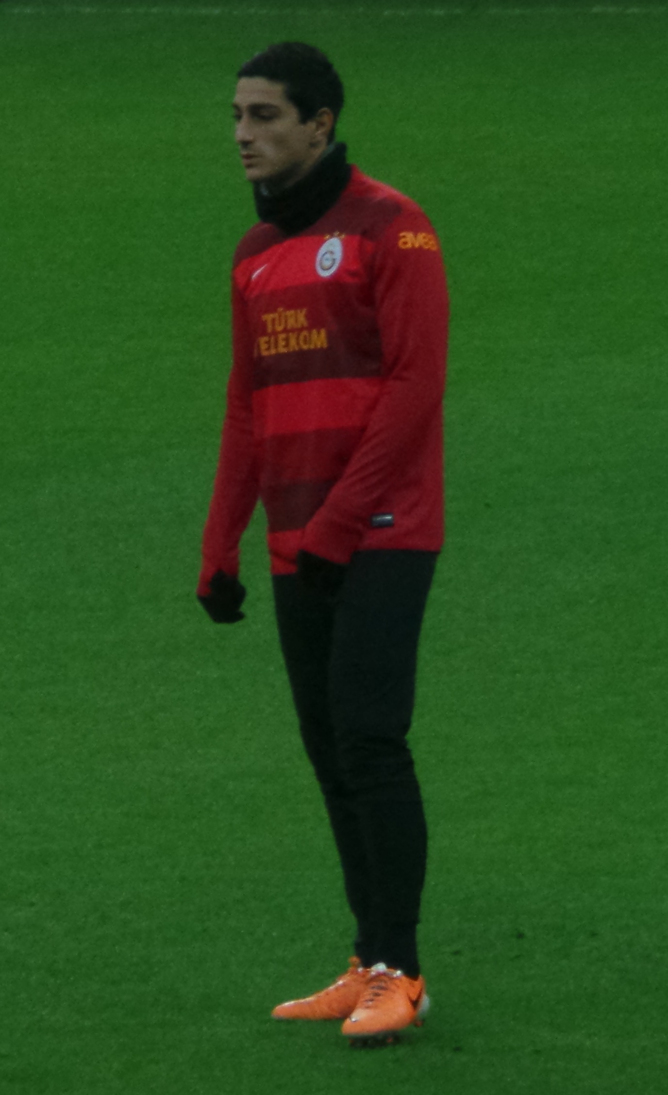 Koray Günter